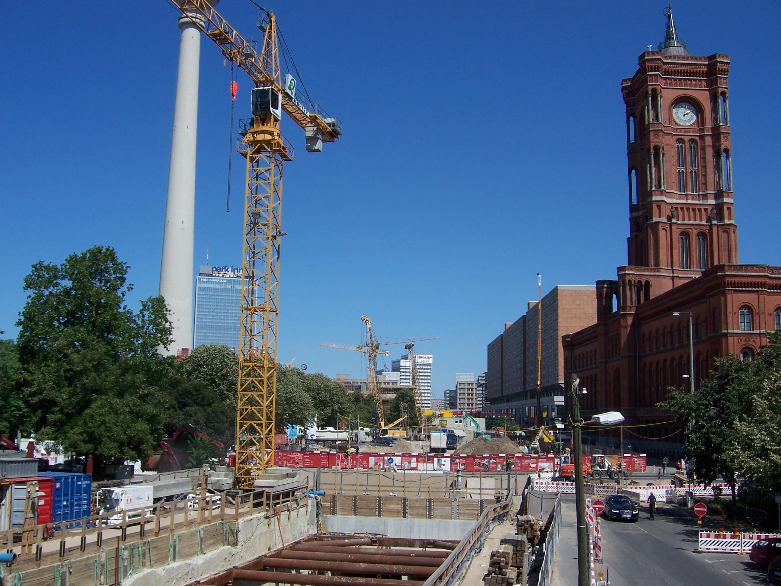 Verlängerung der U-Bahnlinie 5 Berlin, vorne die Startbaugrube, hinten die Baustelle der Station Berliner Rathaus, rechts davon das Rote Rathaus